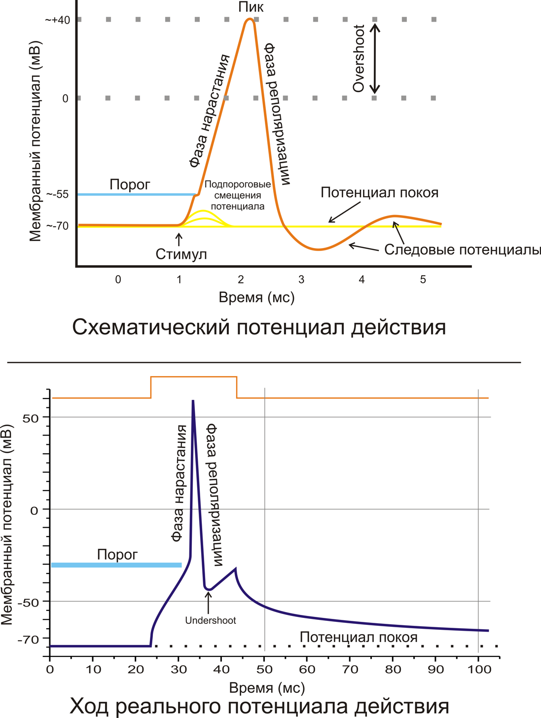 Action potential